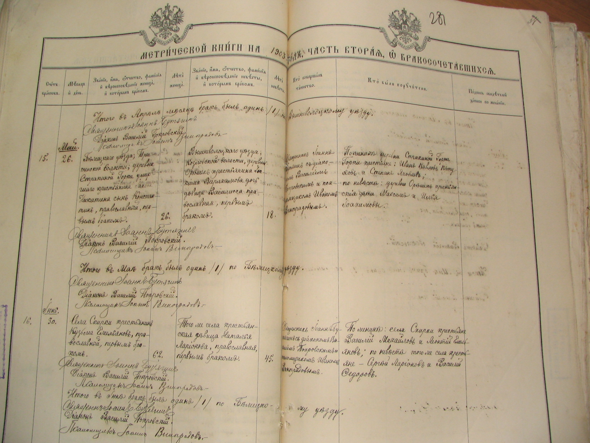 Разворот метрический книги села Скирки Вышневолоцкого уезда Тверской губернии от 1903 года.